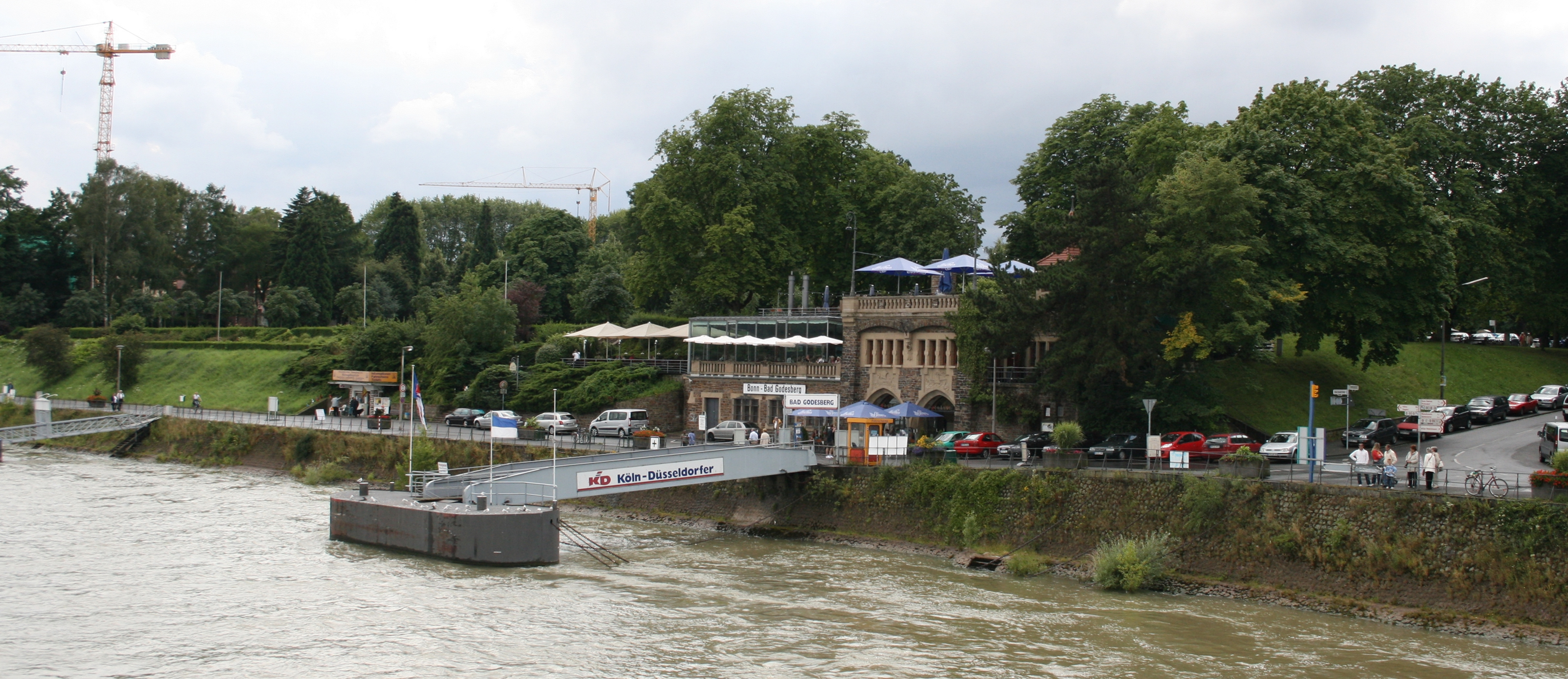 Deutschland, Bonn-Bad Godesberg; Von-Sandt-Ufer/Ecke Rheinallee: Bastei mit Restaurant, Schänke & Biergarten, Panoramapark/Panoramaplatz; KD-Anleger. Ehemalige Dampfschifffahrtsanlegestelle; die ehemalige Wartehalle der Köln-Düsseldorfer dient nun als Schänke